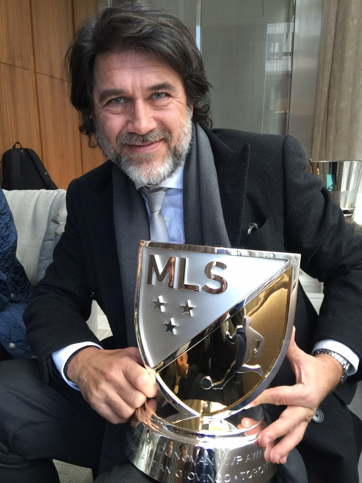 Andrea D'Amico durante il ritiro del premio di Giovinco come miglior giocatore MLS